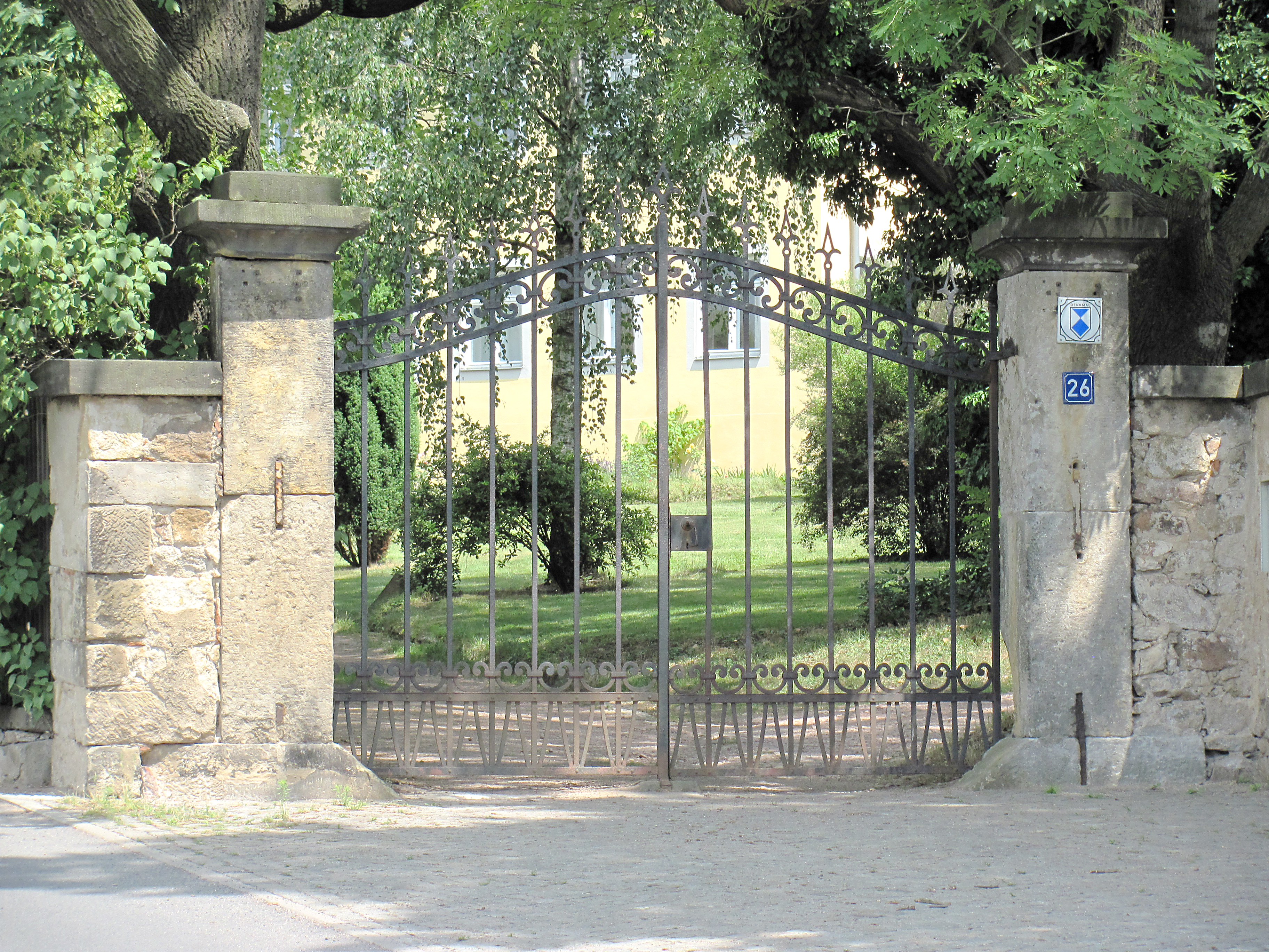 Radebeul, Kynast (Radebeul), Eingangstor